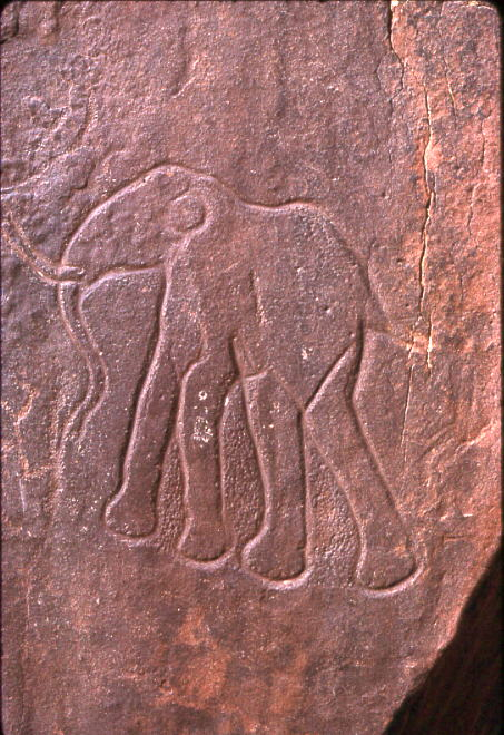 Gravure préhistorique du Sud-oranais, Algérie